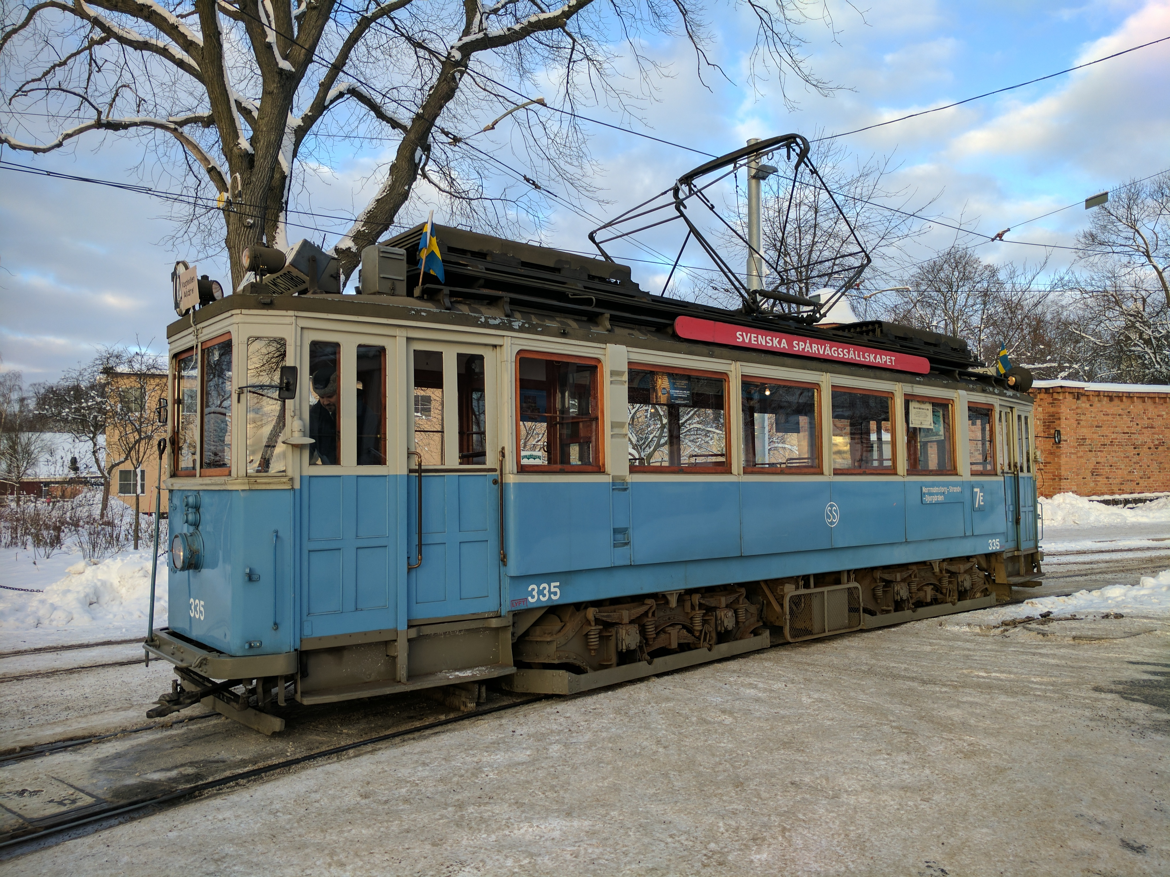 Spårvagn på Djurgårdslinjen